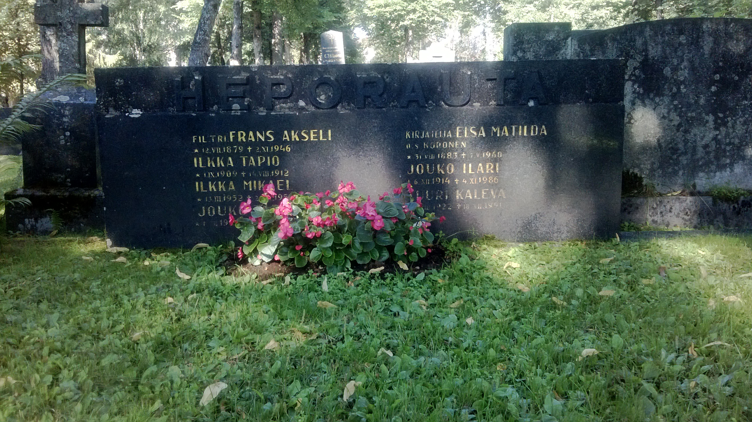 Kirjailija Elsa Heporauta, hautakivi Jyväskylän vanhalla hautausmaalla